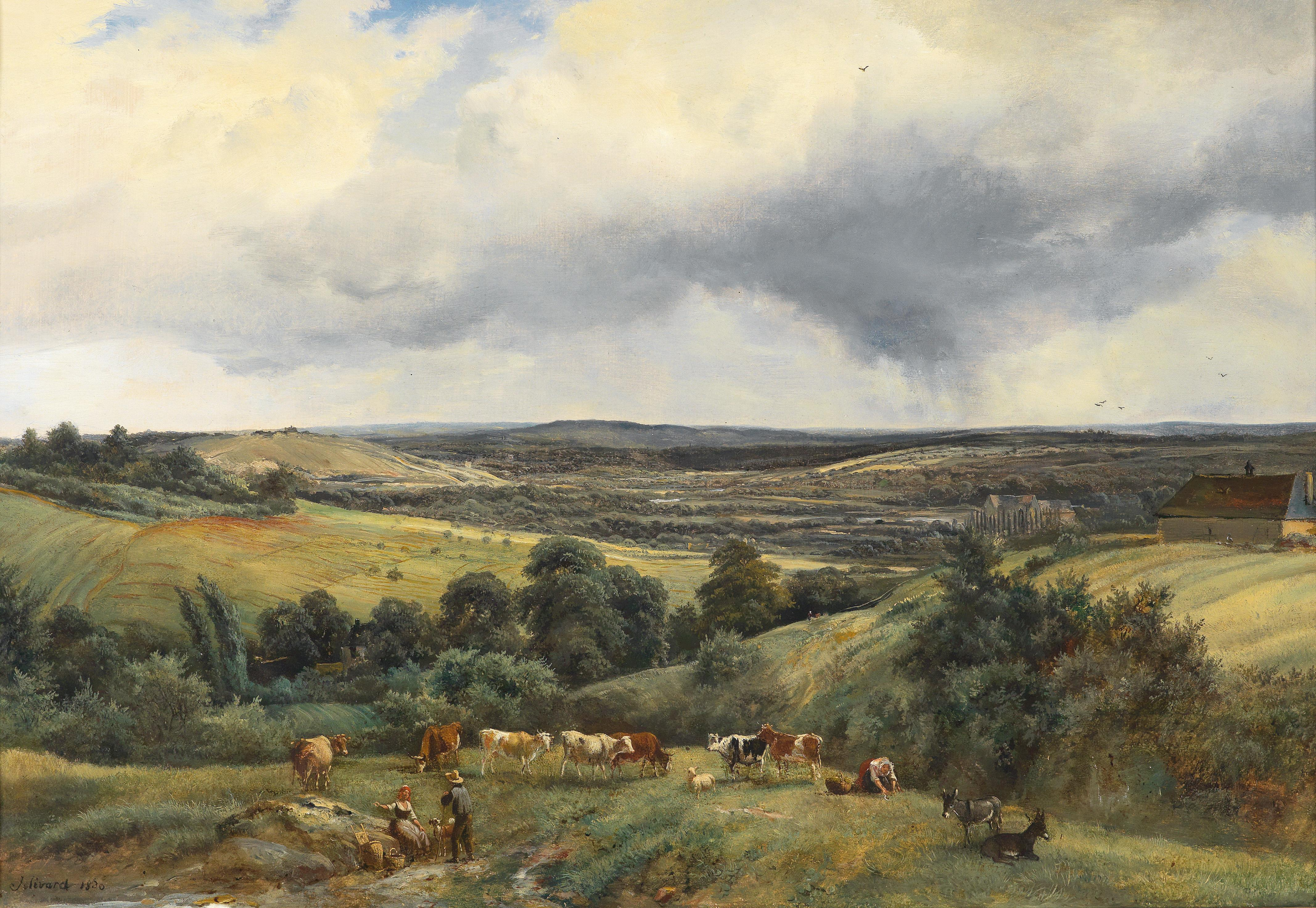 Weite Landschaft mit Tierherde, signiert, datiert Jolivard 1830, Öl auf Leinwand, 46 x 64,5 cm